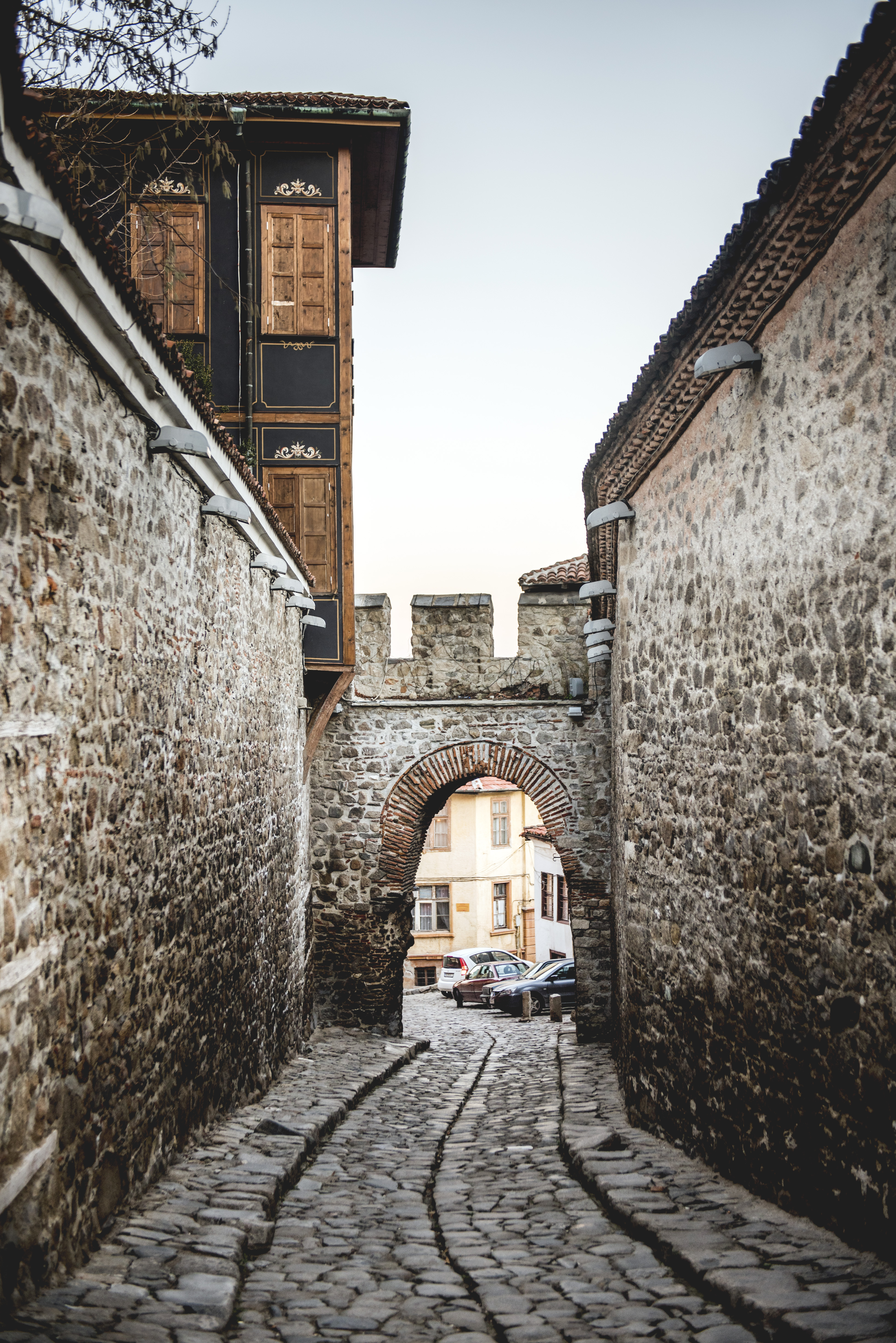 Хисар Капия е един от символите на Пловдив. През VI век е част от отбранителните кули, пазещи Пулпудева. Сегашният и вид е след промени през XII-XIV век. Търпи преустройство и през Възраждането, за да се съхрани. От външната страна на портата днес има площад, а на юг се слива с основите на църквата "Св. св. Константин и Елена".